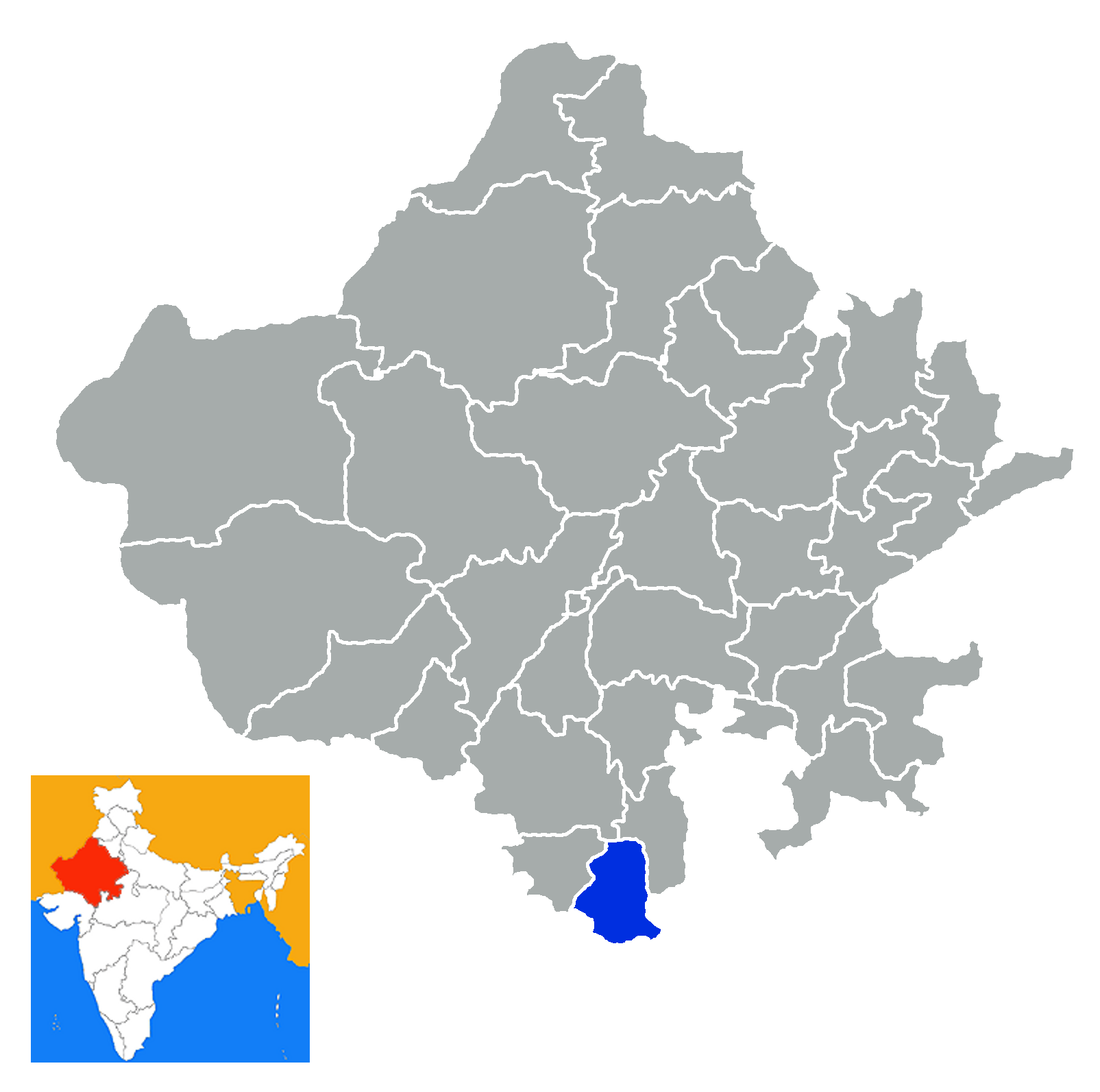 Distrito de Banswara Rajastan India